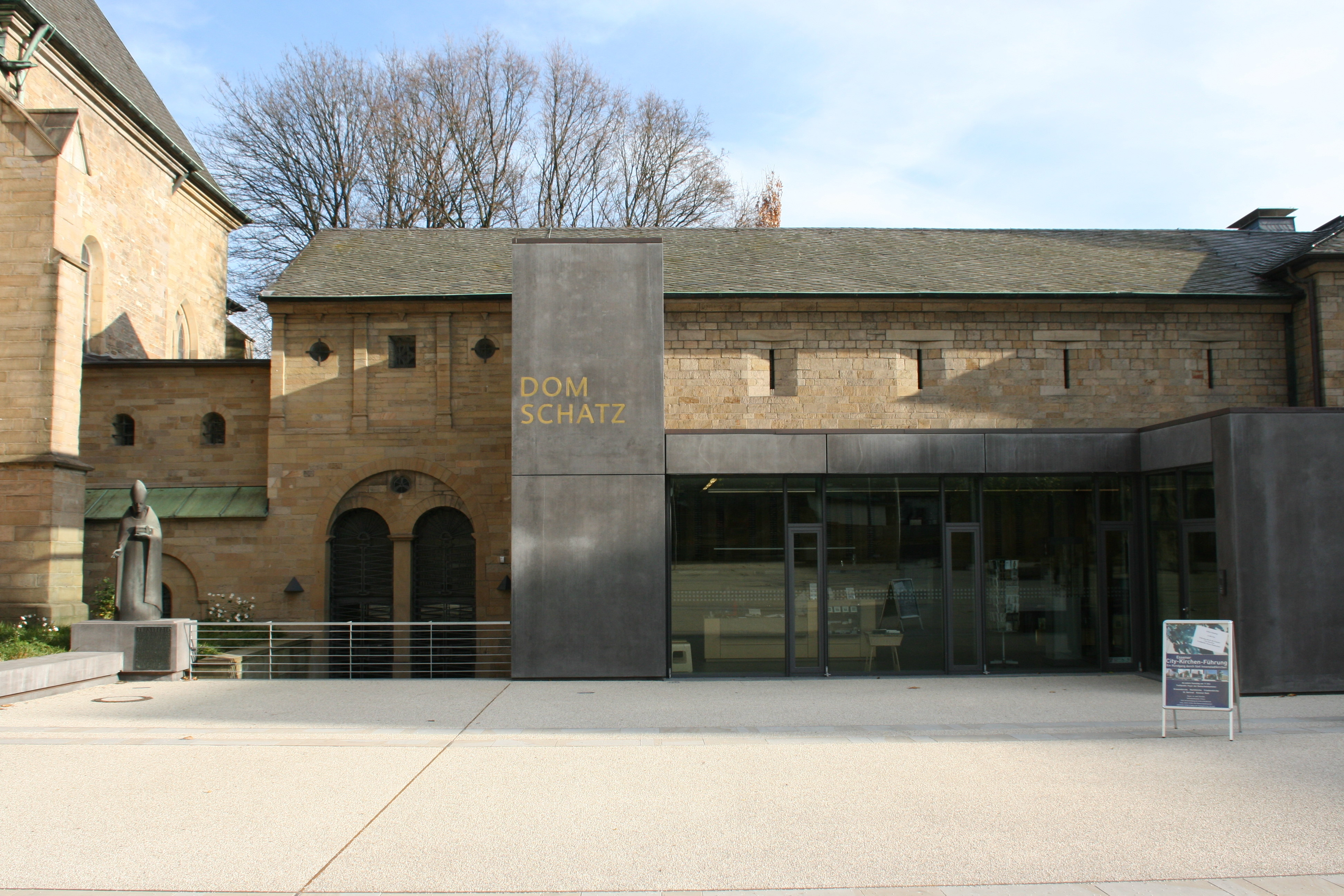 Domschatzkammer am Burgplatz in Essen